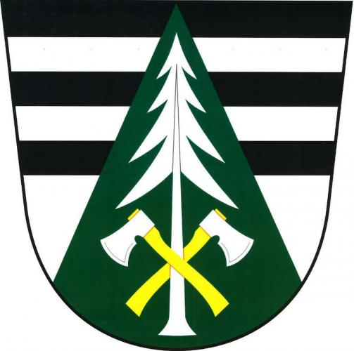 znak, Unčín, okres Žďár nad Sázavou